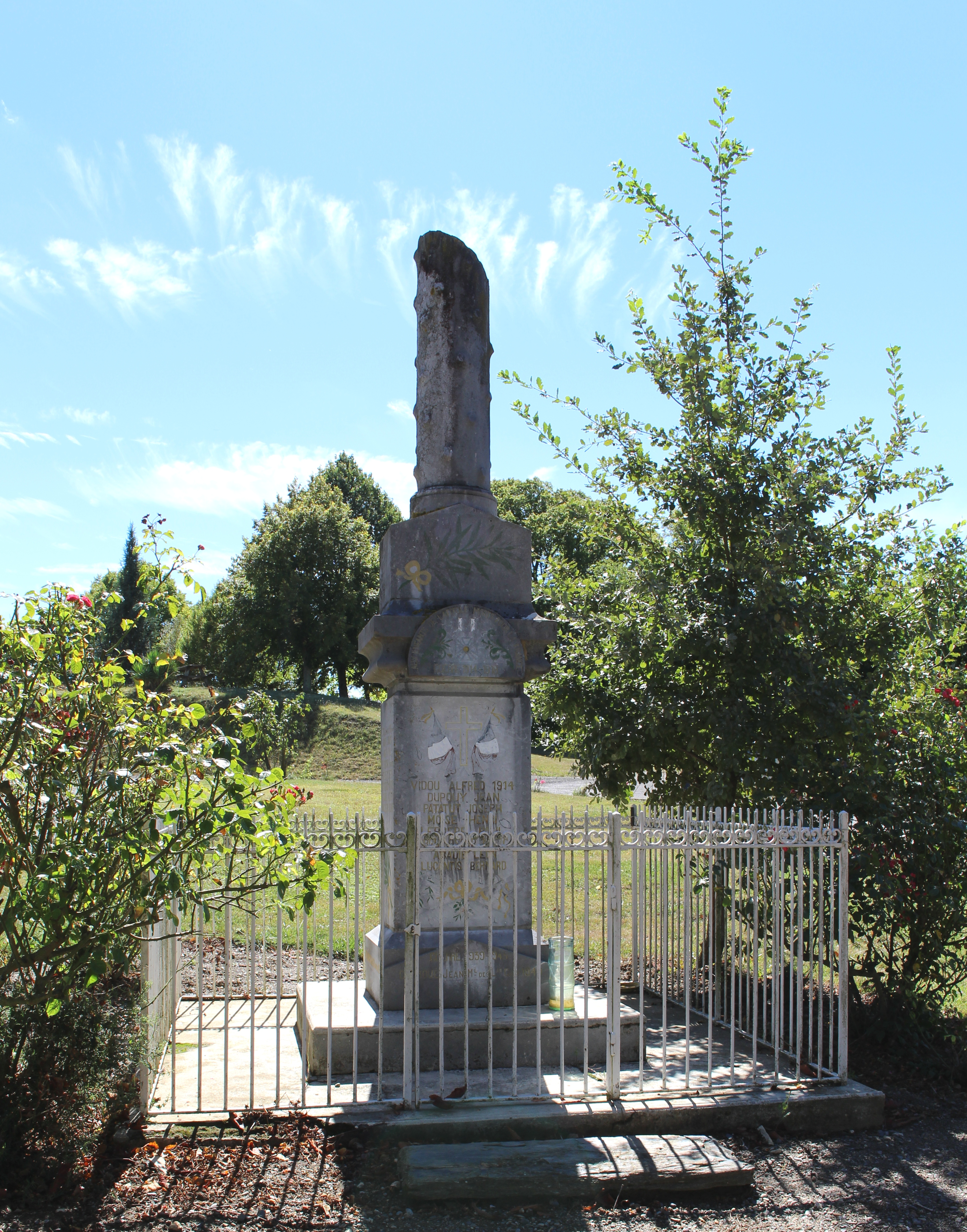 Monument aux morts de Lafitole (Hautes-Pyrénées)